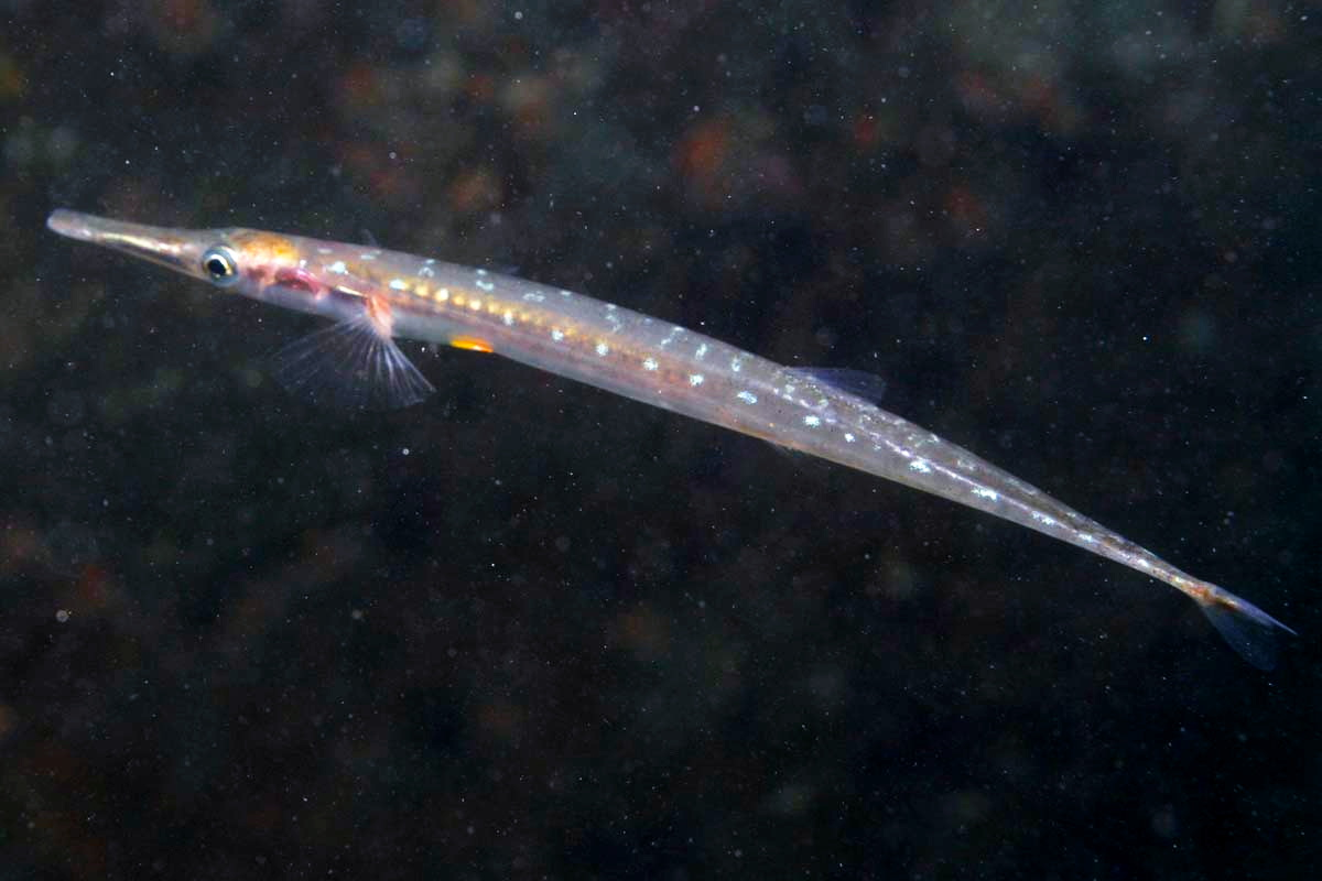 Aulorhynchus flavidus, puerto de Monterey, EE.UU.